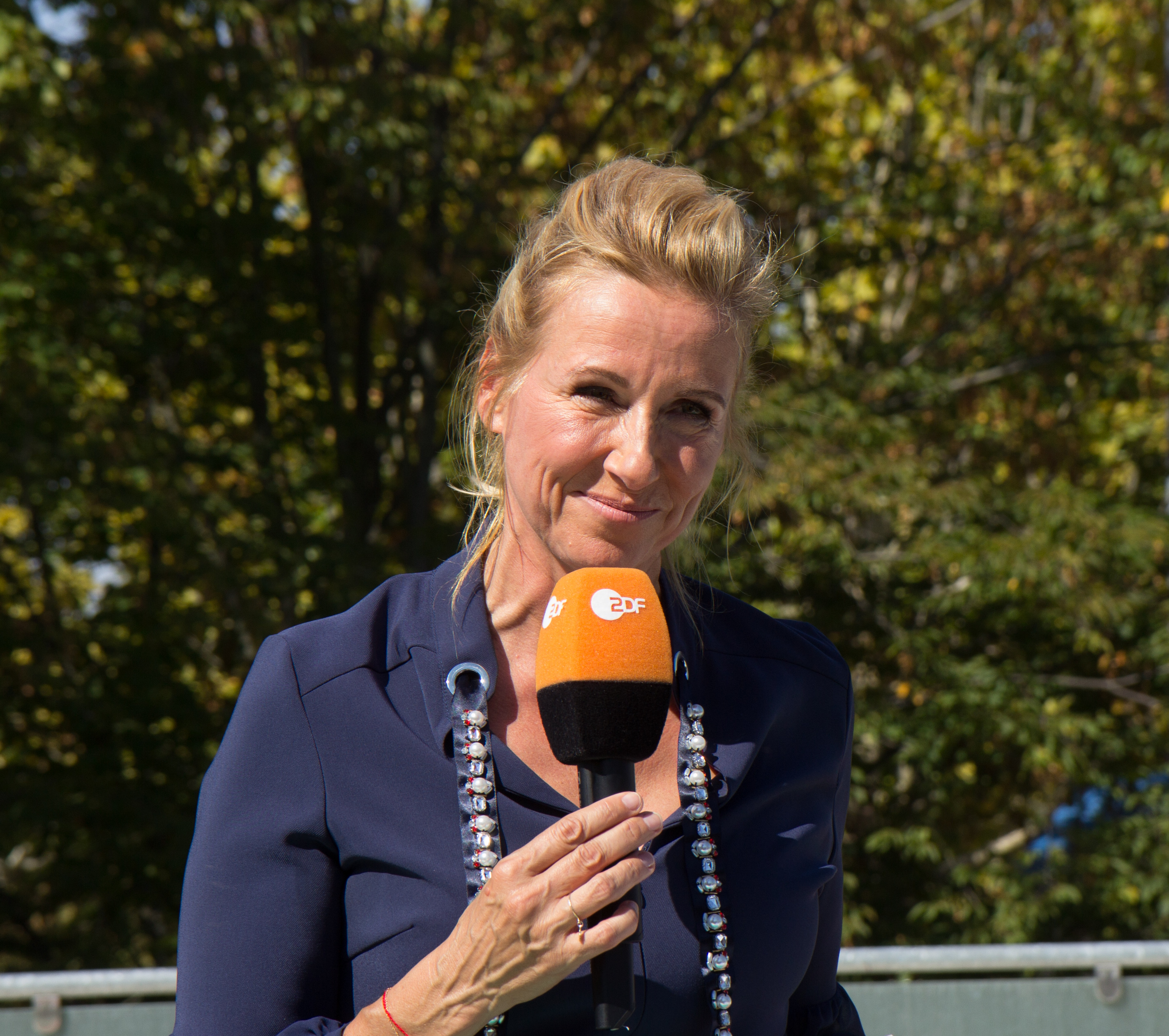 Andrea Kiewel im ZDF-Fernsehgarten am 16. September 2018 in Mainz.